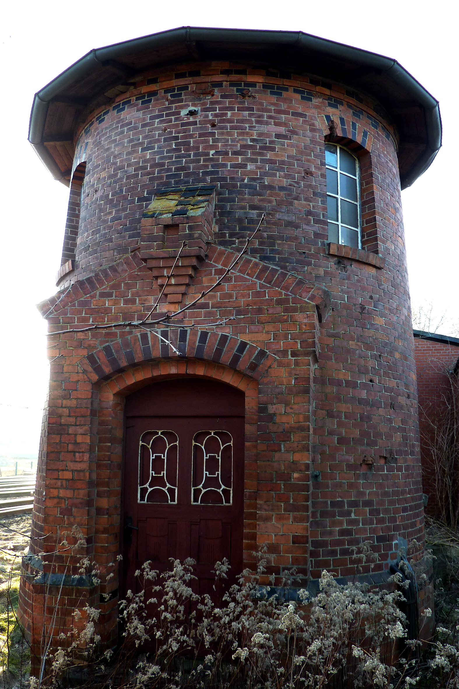 Ehemaliger Wasserturm für Dampfeisenbahnen in Beckedorf, Kreis Celle.